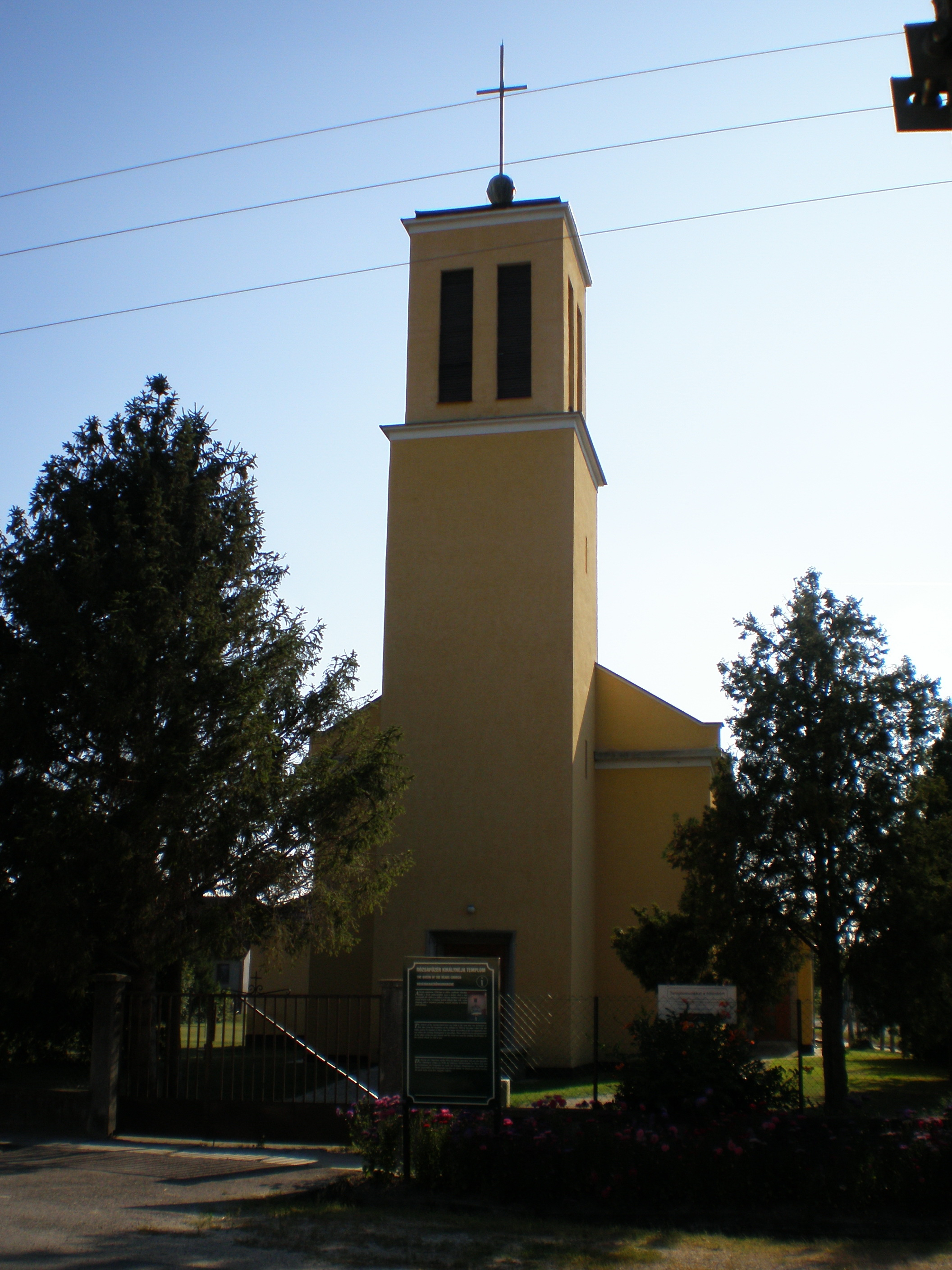 Rózsafűzér királynője templom